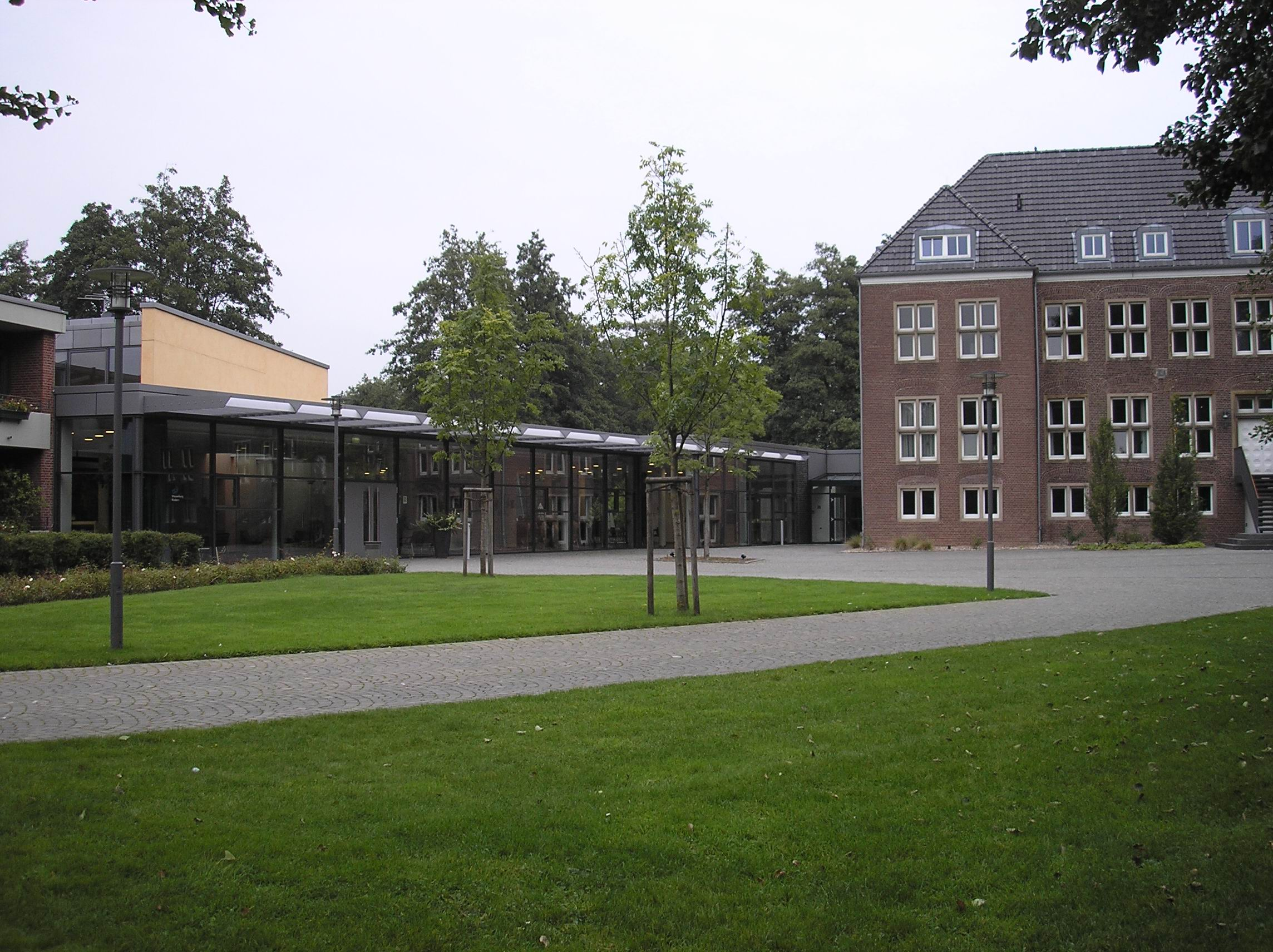 Alter und neuer Gebäudetrakt der "Wasserburg" in Kleve-Rindern